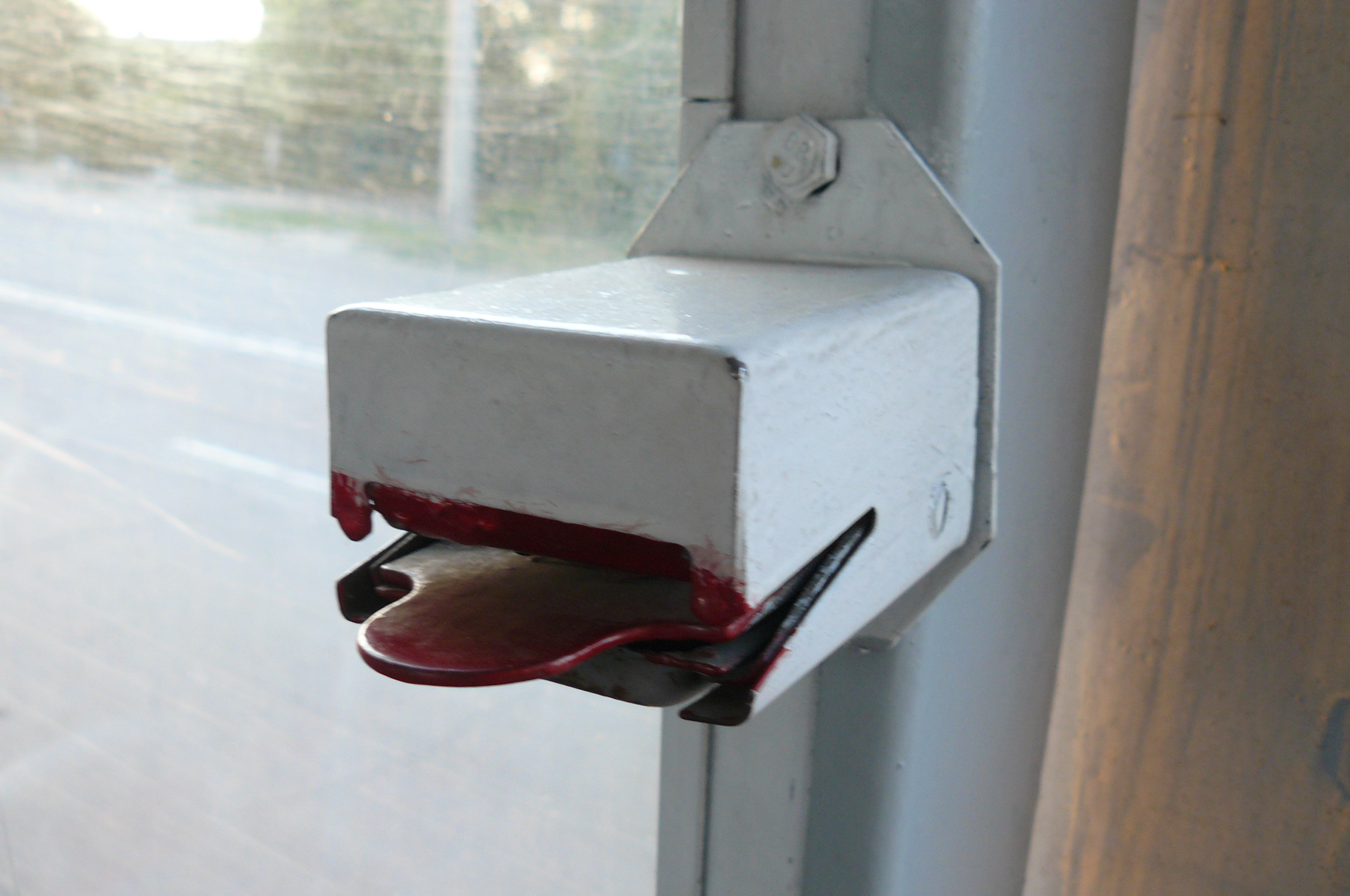 Mariupol trams, juni 2012.